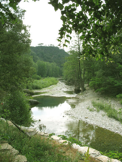 Le Galeizon en été, 2006, Catherine Gheselle